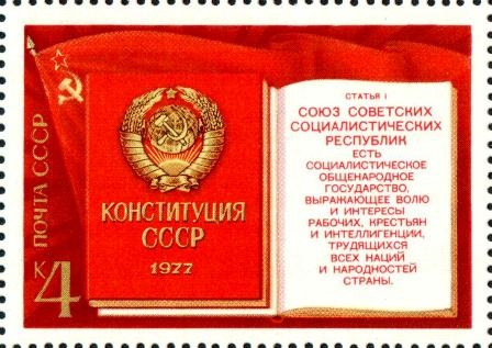 Почтовая марка СССР. 1977. Раскрытая книга Конституции СССР. Номер в каталоге ЦФА 4772